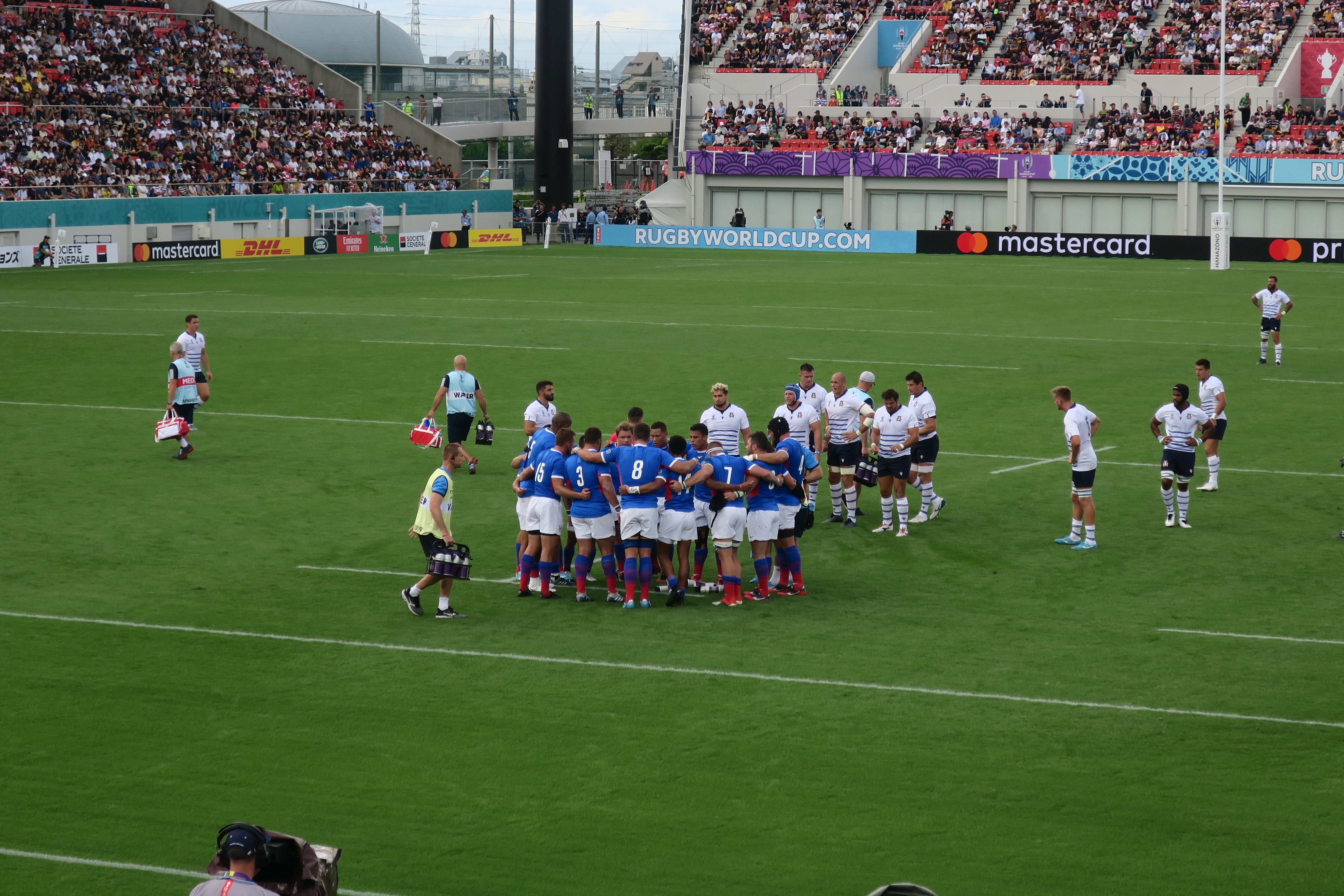 2019 ラグビーワールドカップ イタリア対ナミビア（2019年9月22日、東大阪市花園ラグビー場）